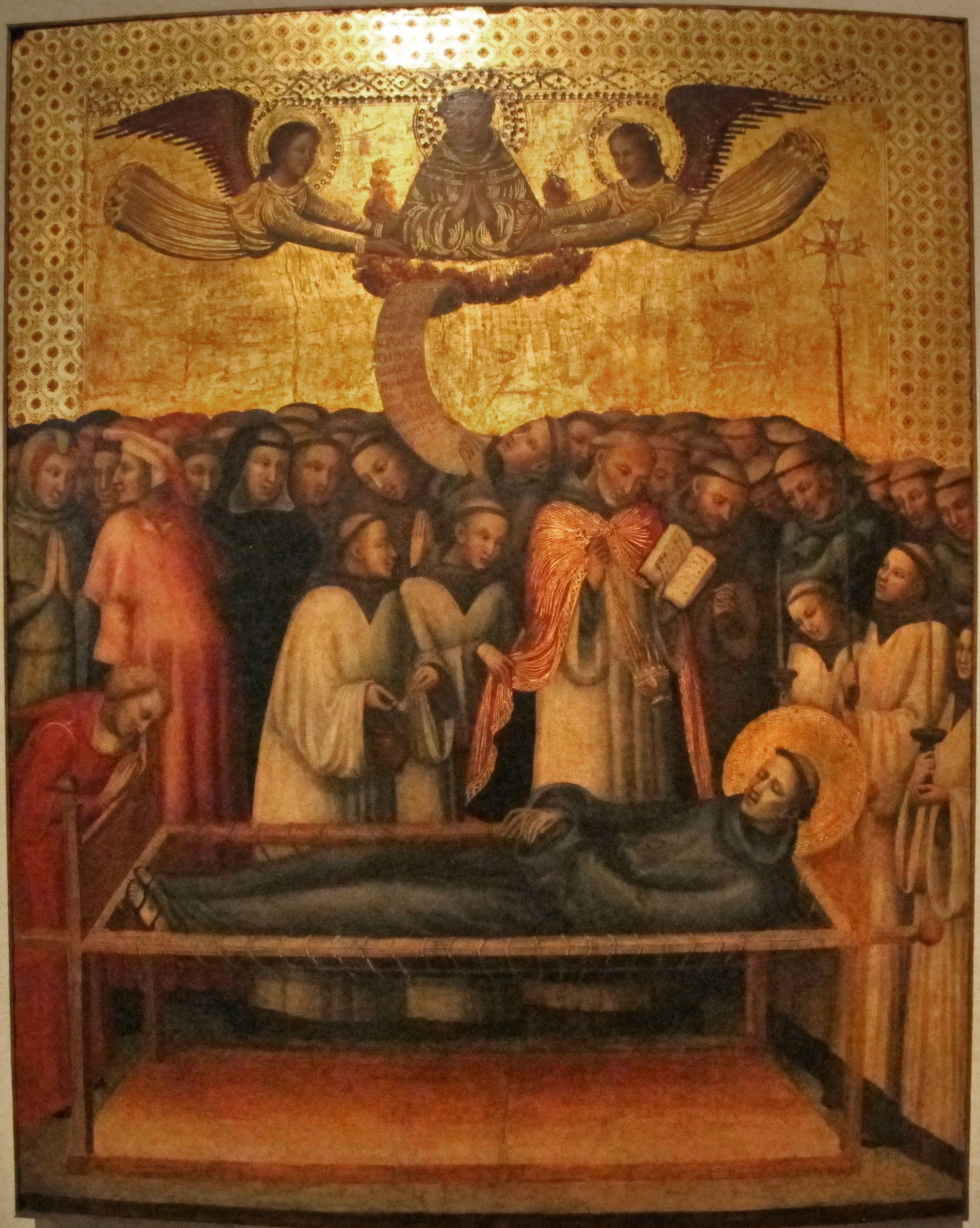 Pinacoteca Vaticana